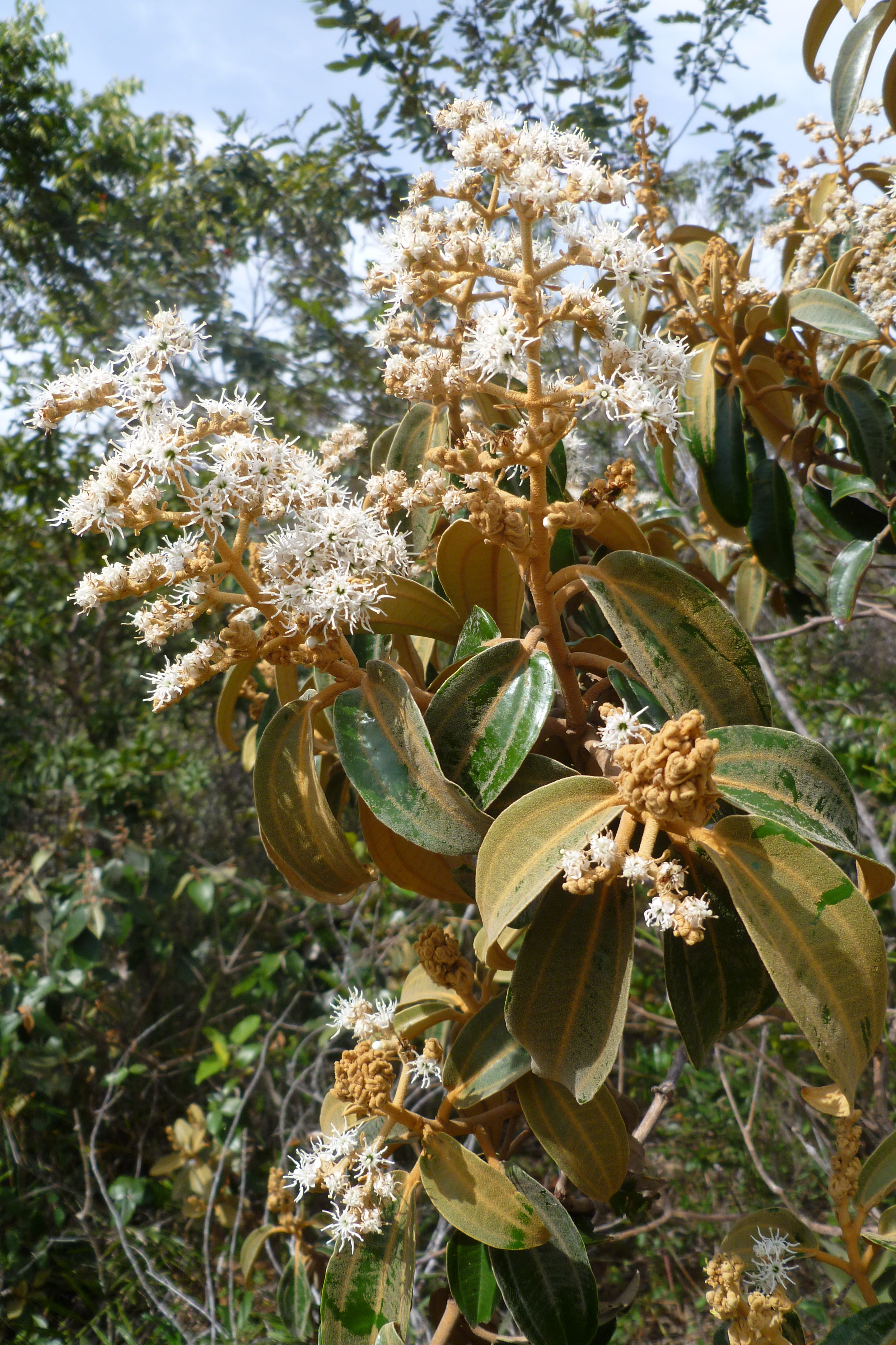 Miconia ferruginata DC. en brazila savano.